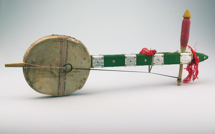 De ribab is een belangrijk instrument in een Berbermuziekstijl die "muziek van Rouais" wordt genoemd oftewel Troubadours, en die met name in de Anti-Atlas en Sous-valei wordt gespeeld. De ribab wordt met behulp van een koord om de schouders gehangen en met de strijkstok bespeeld net als een viool. De basis van deze muziekstijl wordt gevormd door een klein orkest bestaand uit een zestal leden dat onder leiding van een rays (meester) staat die dit instrument zelf bespeelt en vaak ook de zanger van de groep is. Soms wordt deze rol door een vrouw vervuld, zij wordt dan de tarayst genoemd. Naast de ribab bestaan de instrumenten van dit gezelschap uit twee luthars (snaarinstrumenten), een nakoes (ijzeren kast waarop met twee ijzeren staafjes wordt geslagen) en een trommel (tallount) als percussieinstrument.